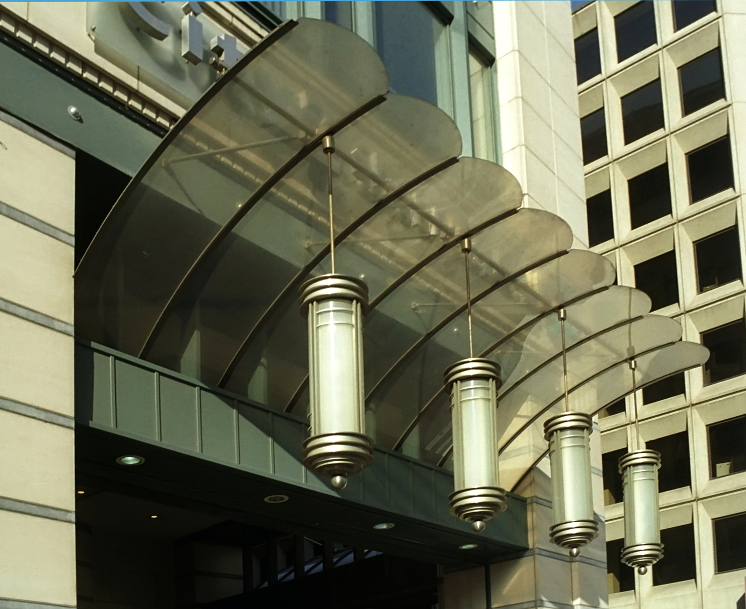 Belgique - Bruxelles - City 2 Shopping Mall (Architecture postmoderne en Belgique - Atelier d'Art Urbain)